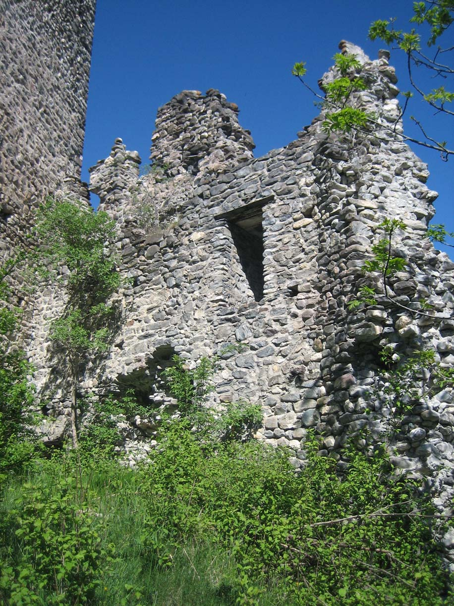 Reste des Palas/Ringmauer